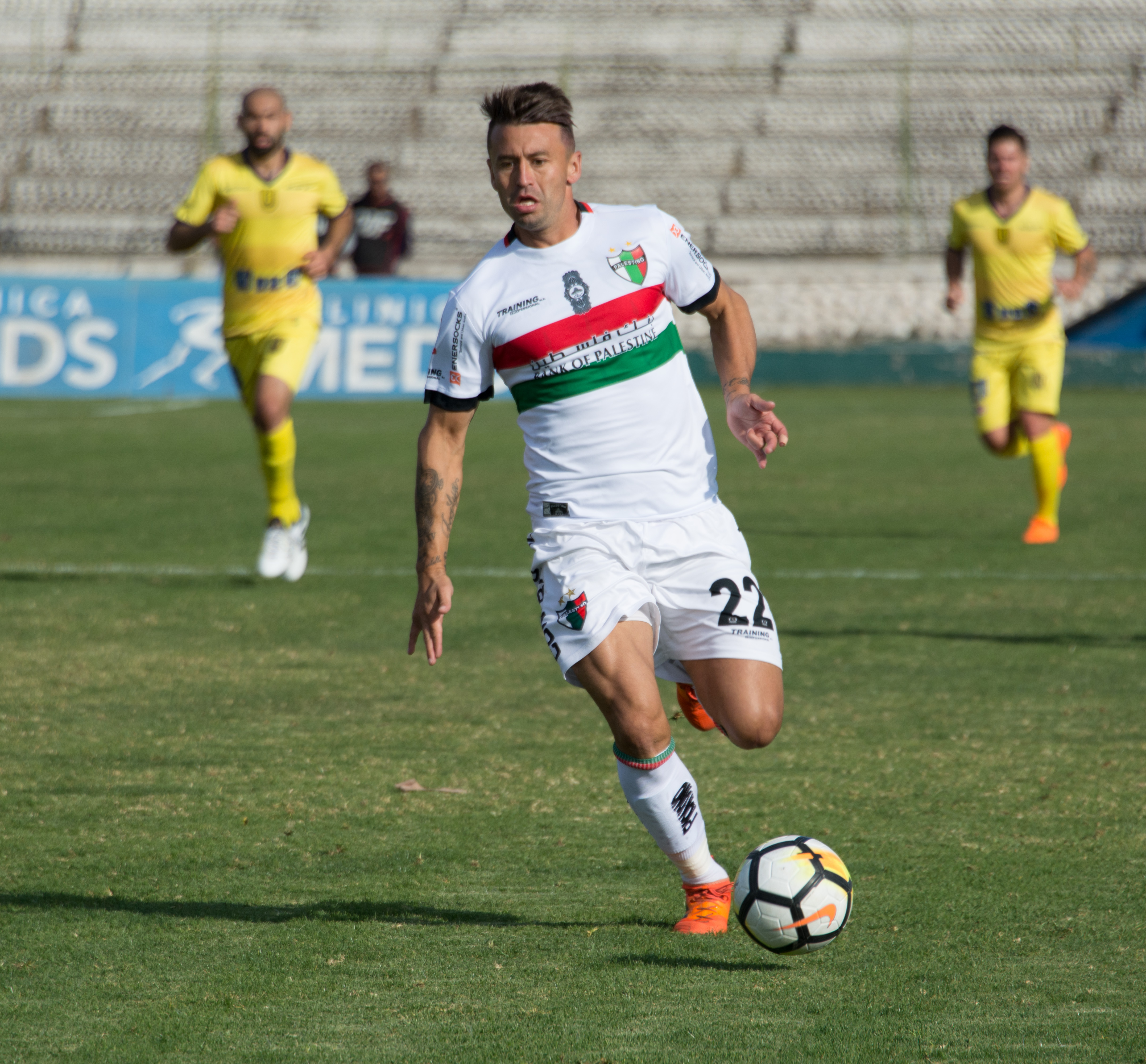 Roberto Gutiérrez, Palestino v Universidad de Concepción, Estadio Municipal de La Cisterna, La Cisterna, Santiago, Chile.